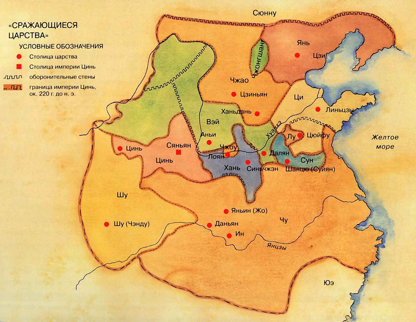 Карта Китая периода Сражающихся царств